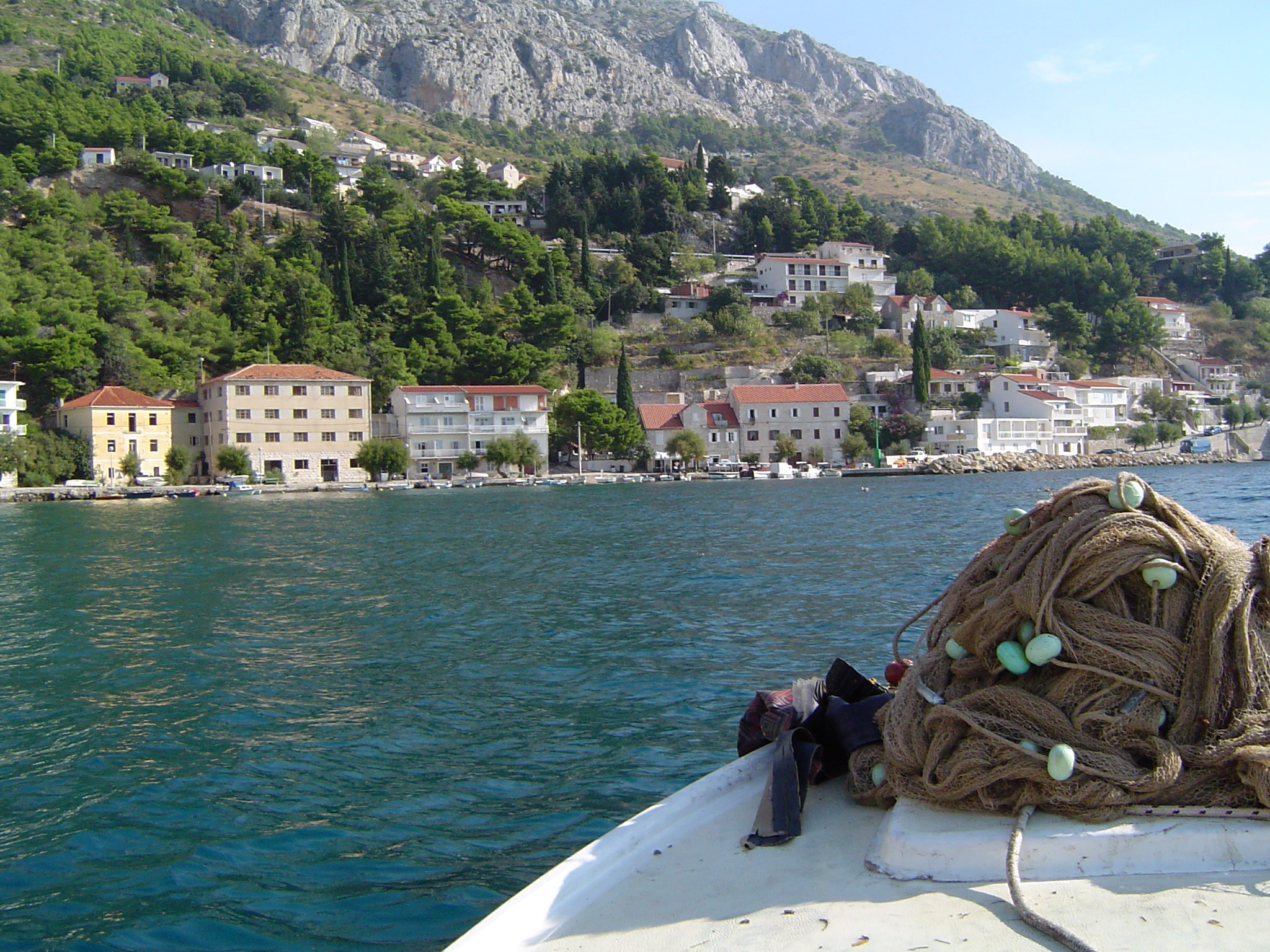 Mimice